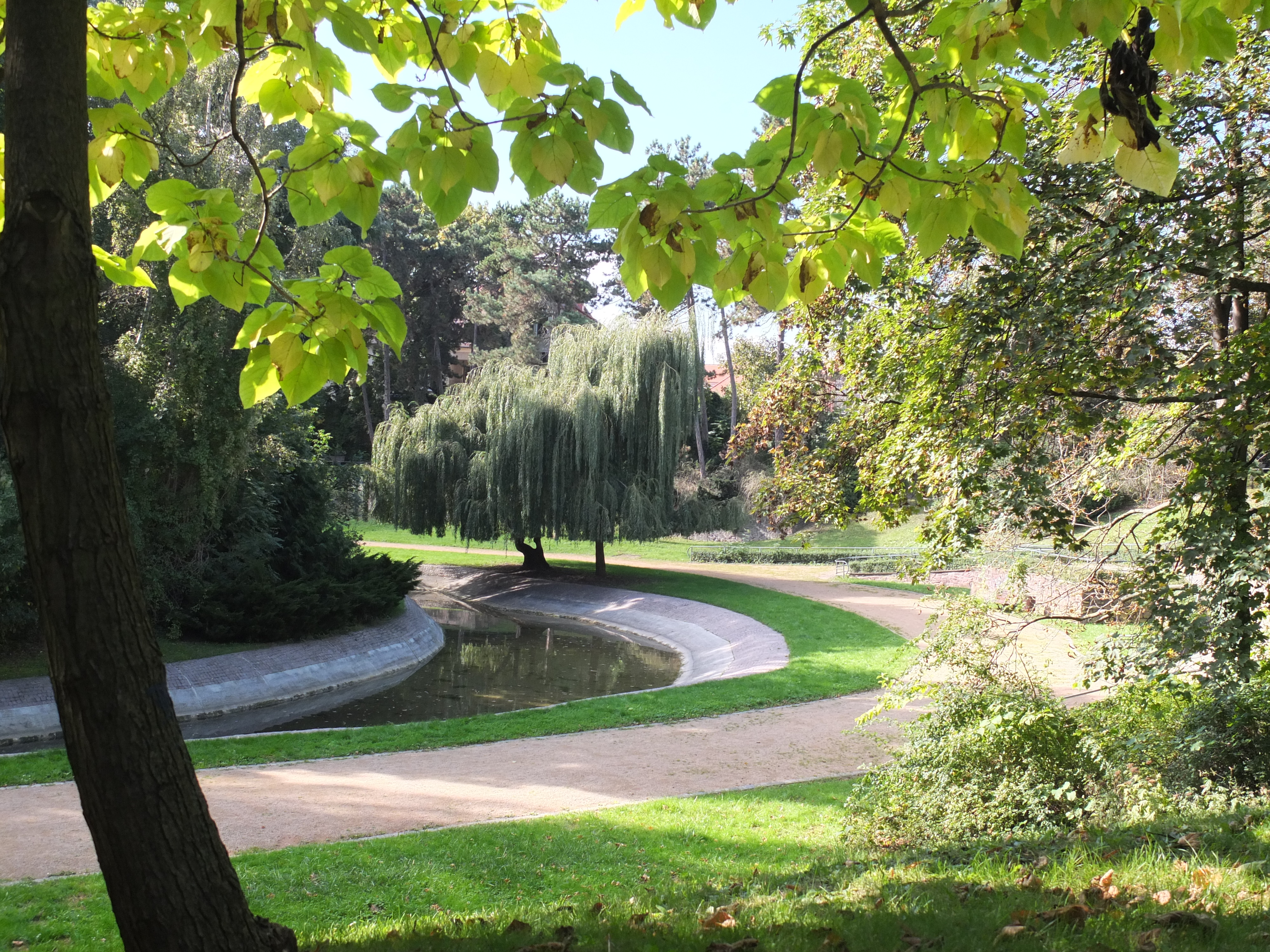 Blick auf den Teich im Geschwister-Scholl-Park Magdeburg